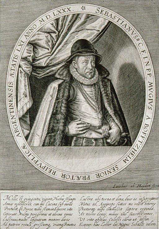 Sebastianus C.F.I.N.P.P. Mugius à Bofftzheim Senior Praetor Republicae Argentinensio Aetatis LXI Anno MDLXXX, Mi-corps, profil 3/4 à dr., en méd. ov. 1600. Bibliothèque nationale et universitaire de Strasbourg